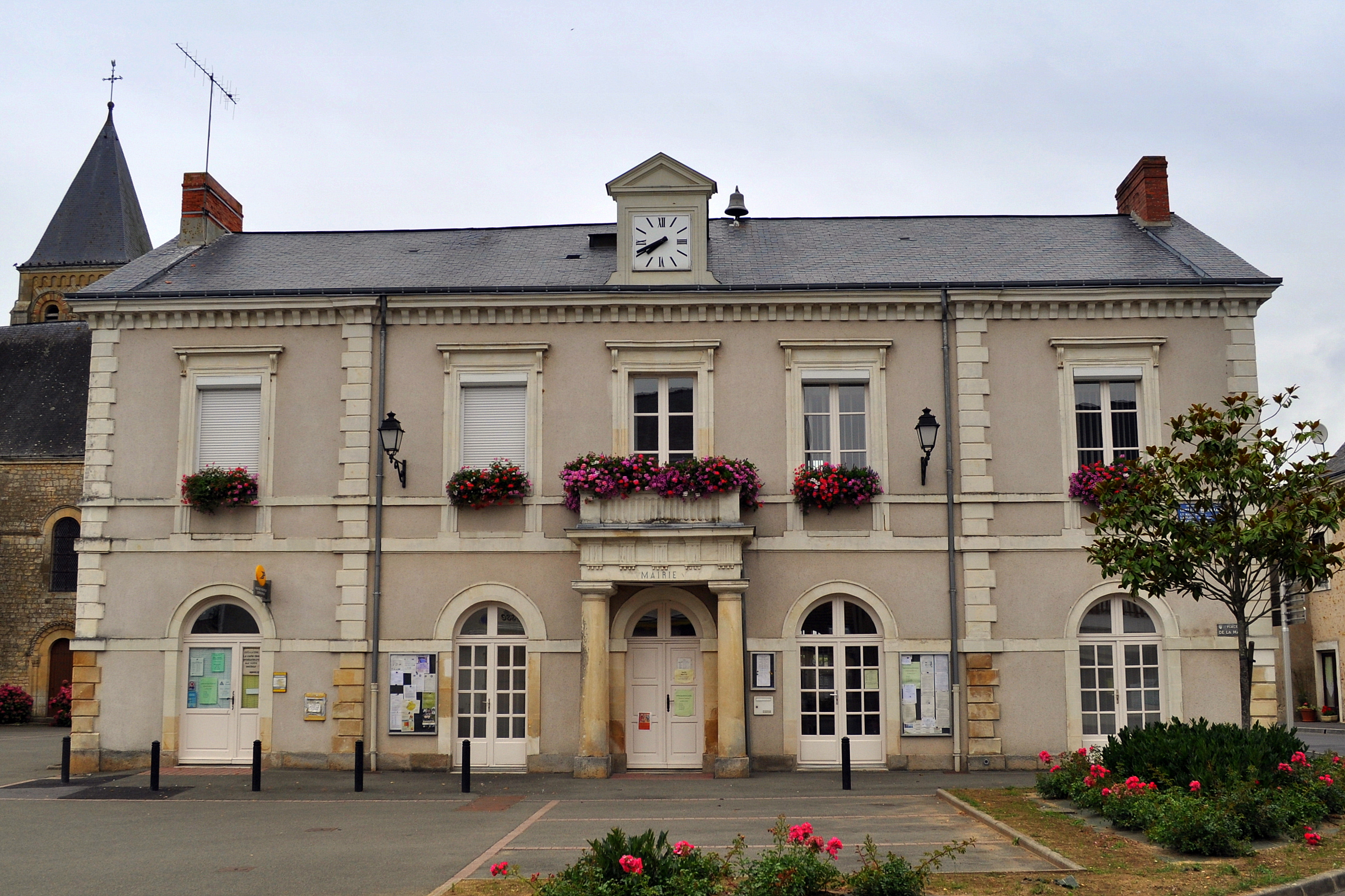 Mairie du Bailleul (Sarthe)